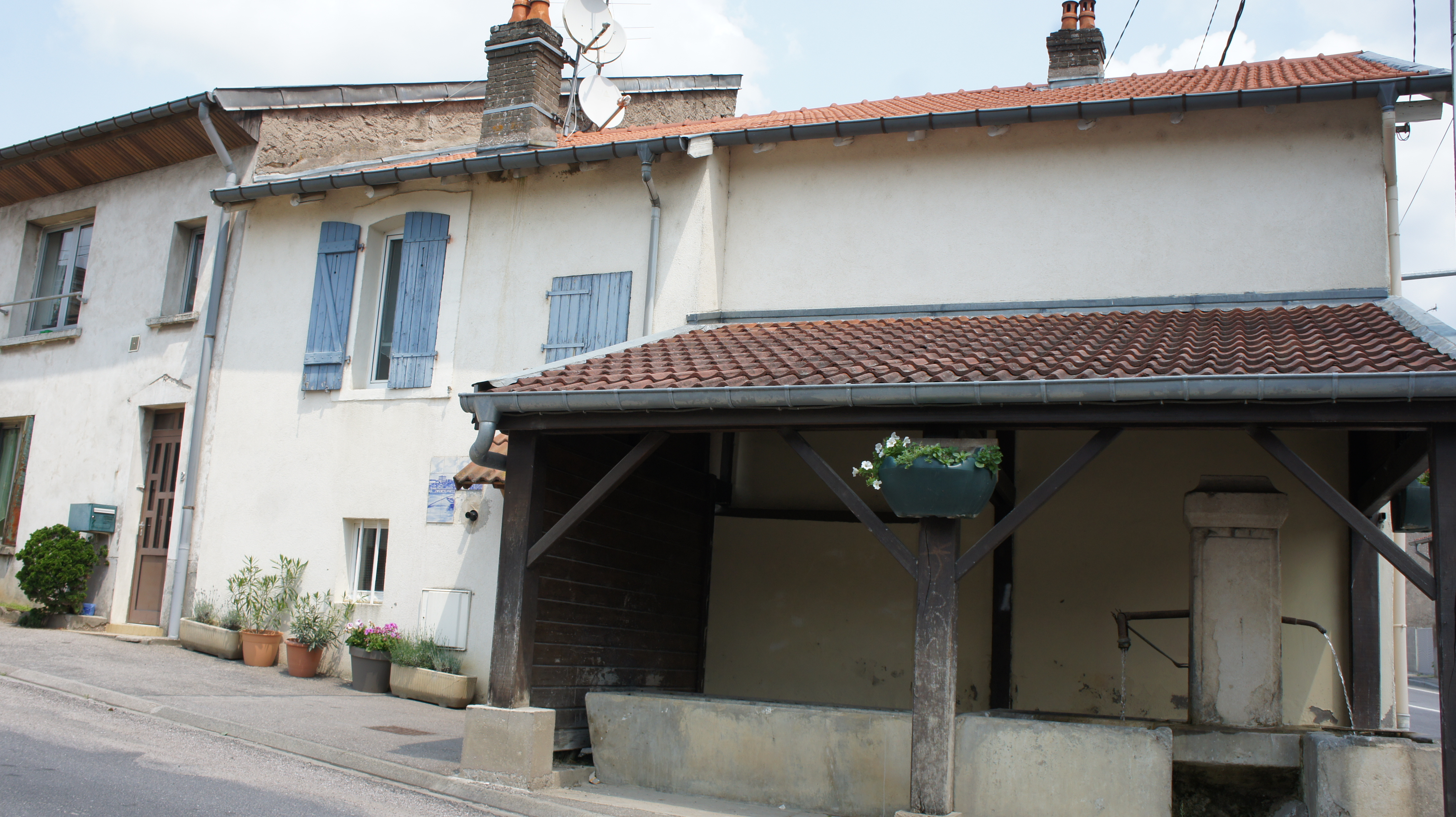 vue d'un lavoir .